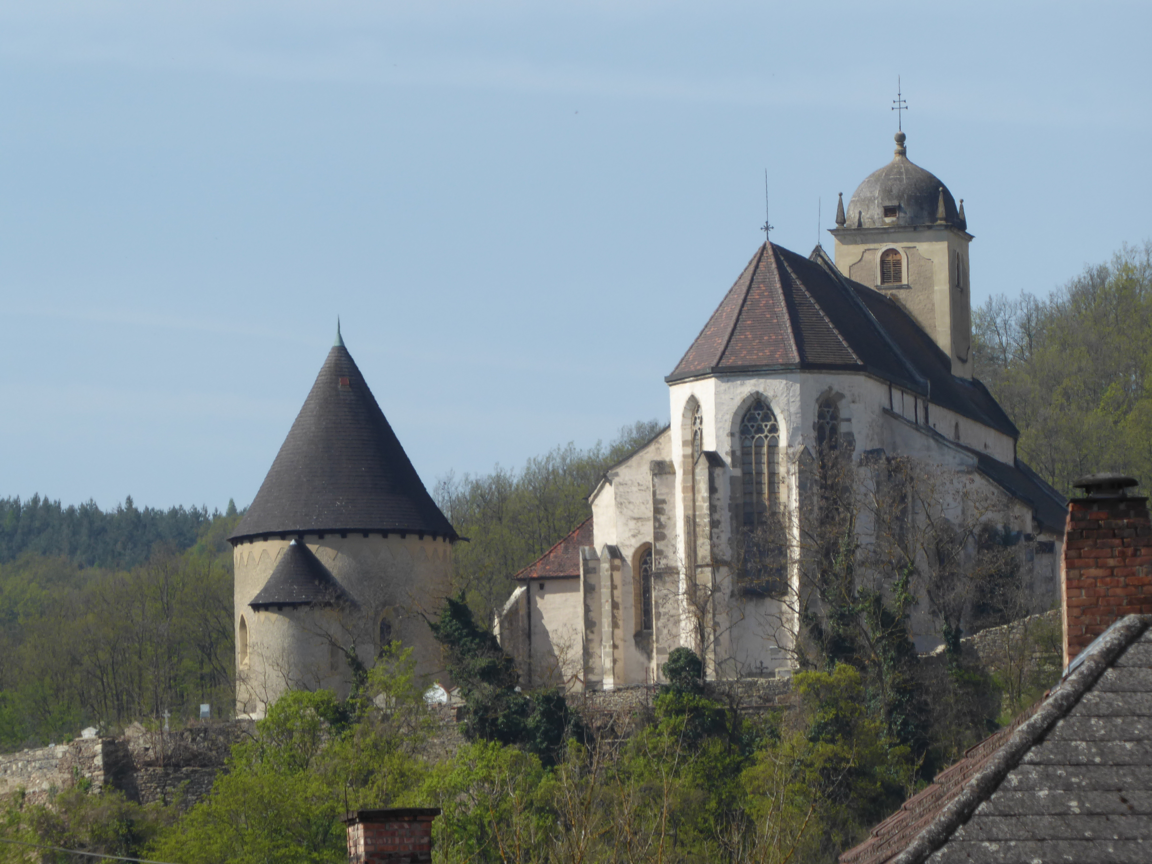 Pfarrkirche hl. Gertrud und Friedhof in Thunau am Kamp, Gars, Niederösterreich, von der Pfarrkirche Gars aus gesehen